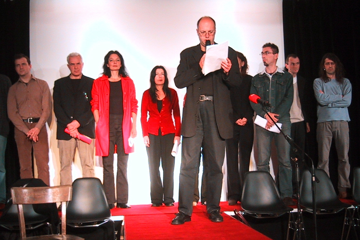 Eine Gruppenveranstaltung der GAV im Literaturhaus Graz (2003) v. li. nach re: Werner Schandor, Wolfgang Pollanz, Birgit Pölzl, Petra Ganglbauer, Günter Eichberger, Monika Wogrolly, Helwig Brunner, Dietmar Füssel, Mike Markart.